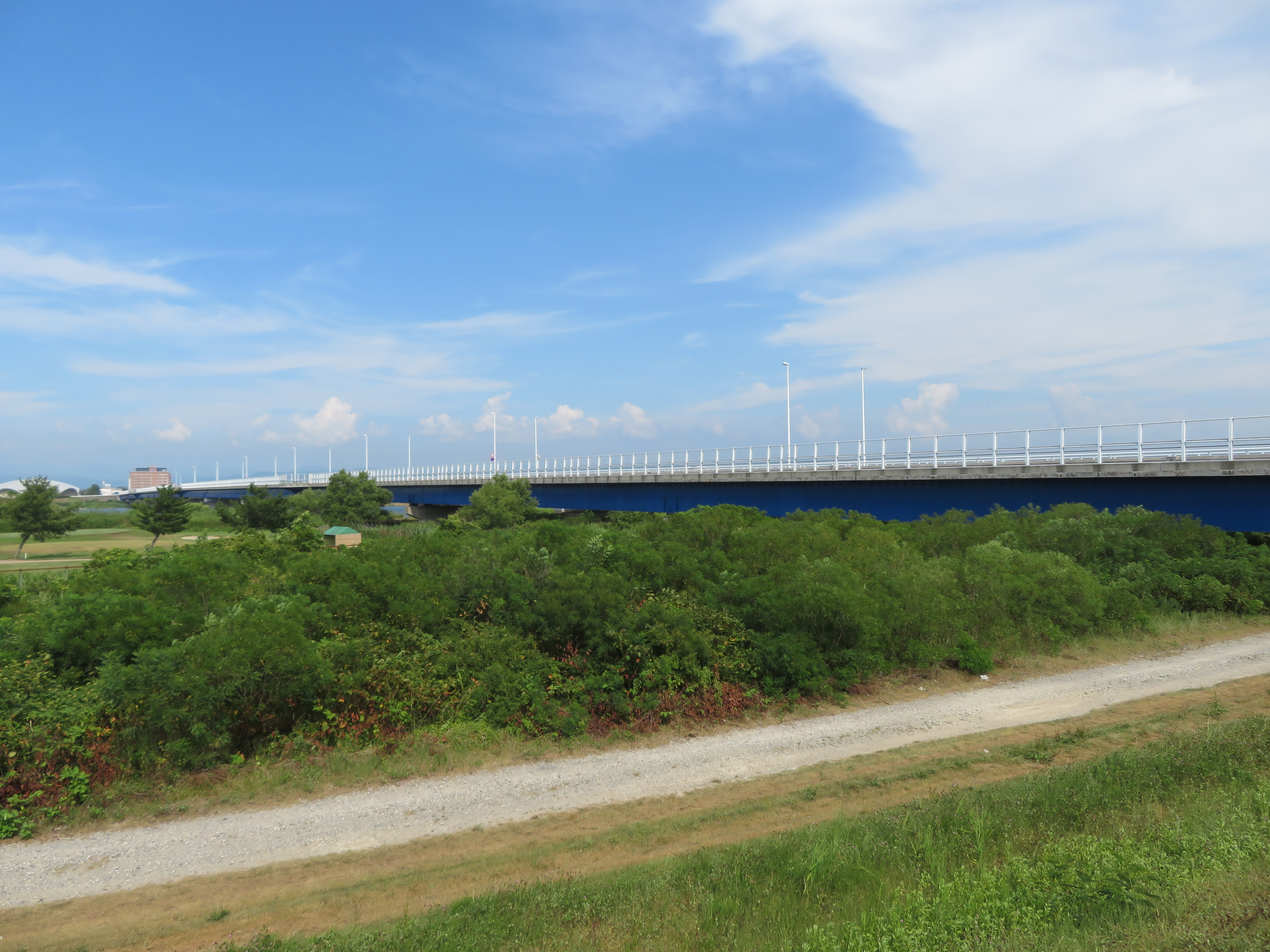 国道112号線 出羽大橋（最上川の渡河部を撮影）